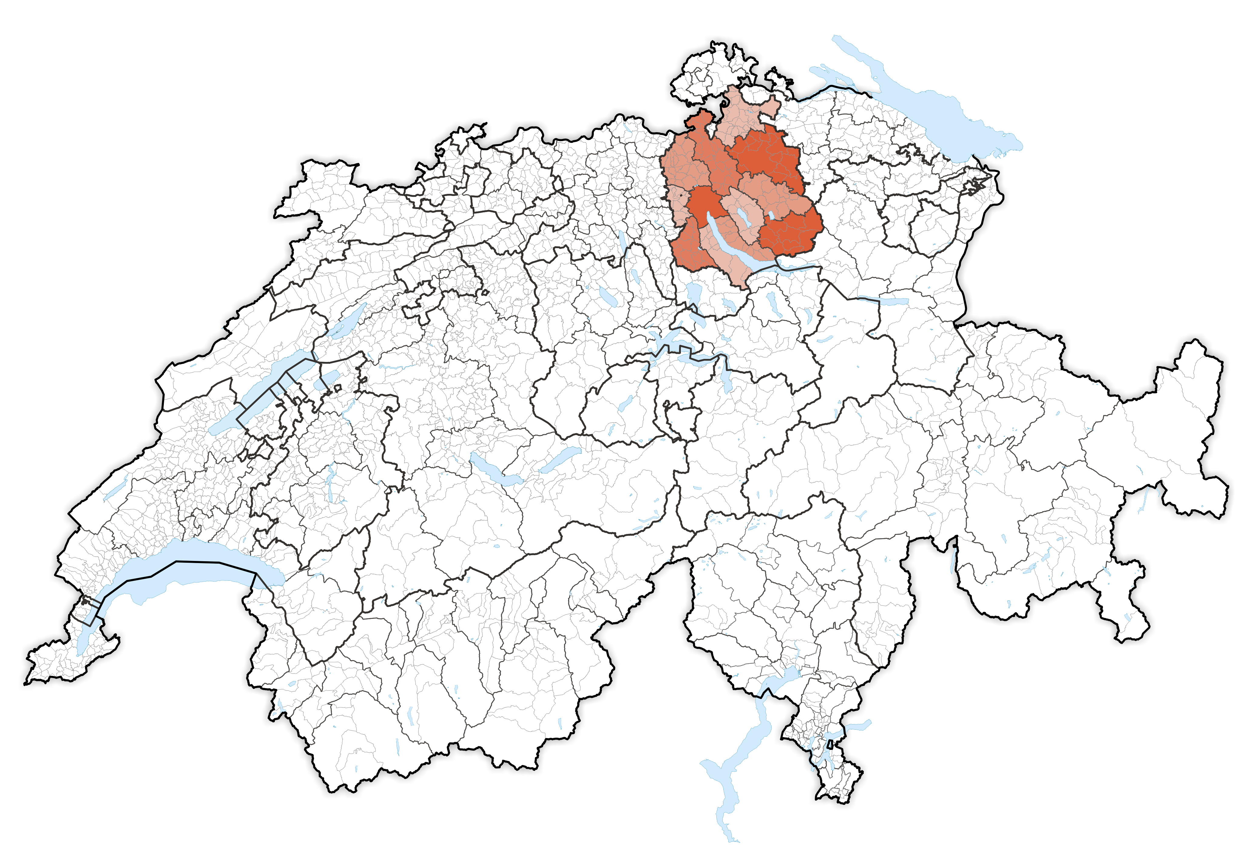 Canton Zürich